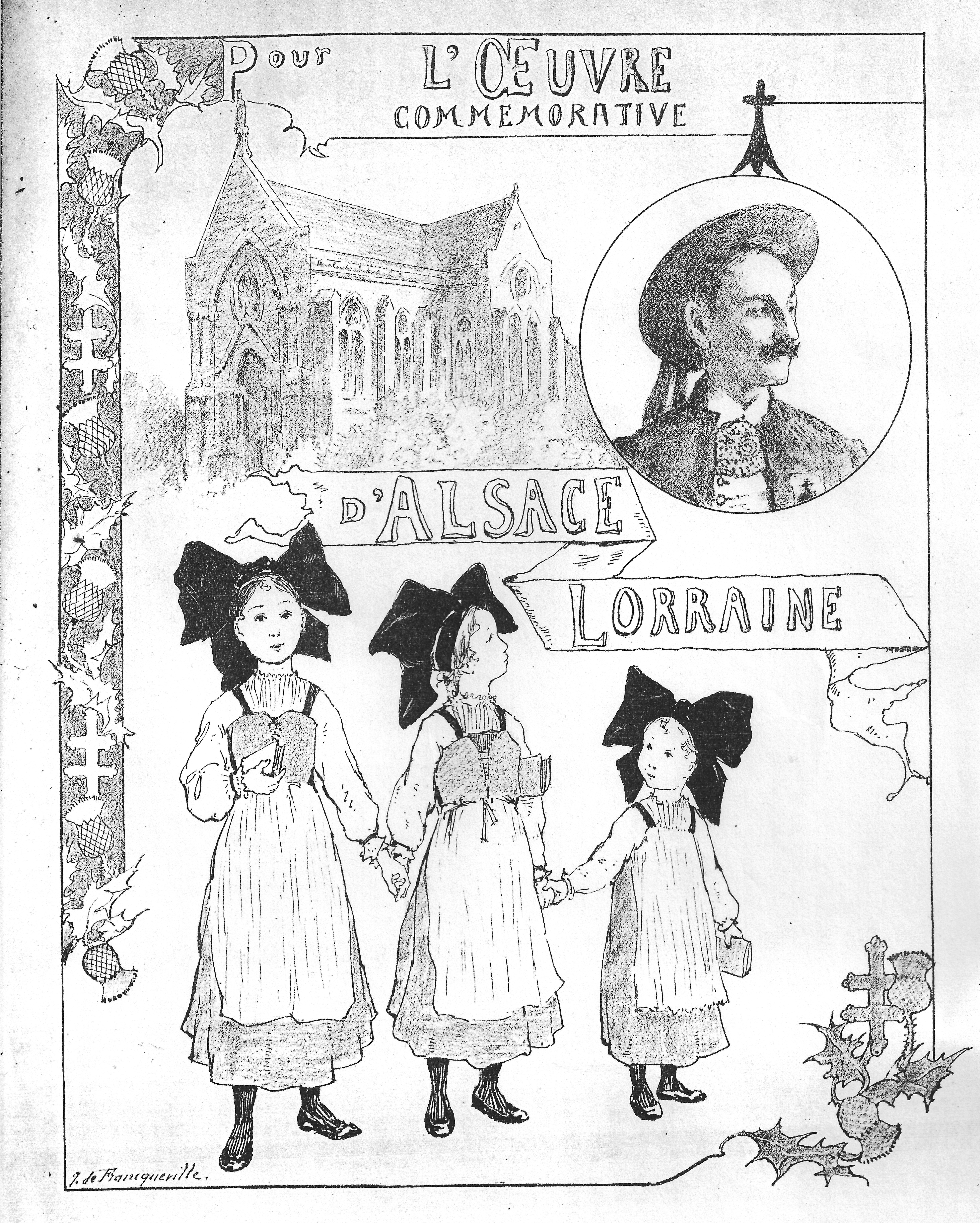 Affiche 4 Jean de Francqueville